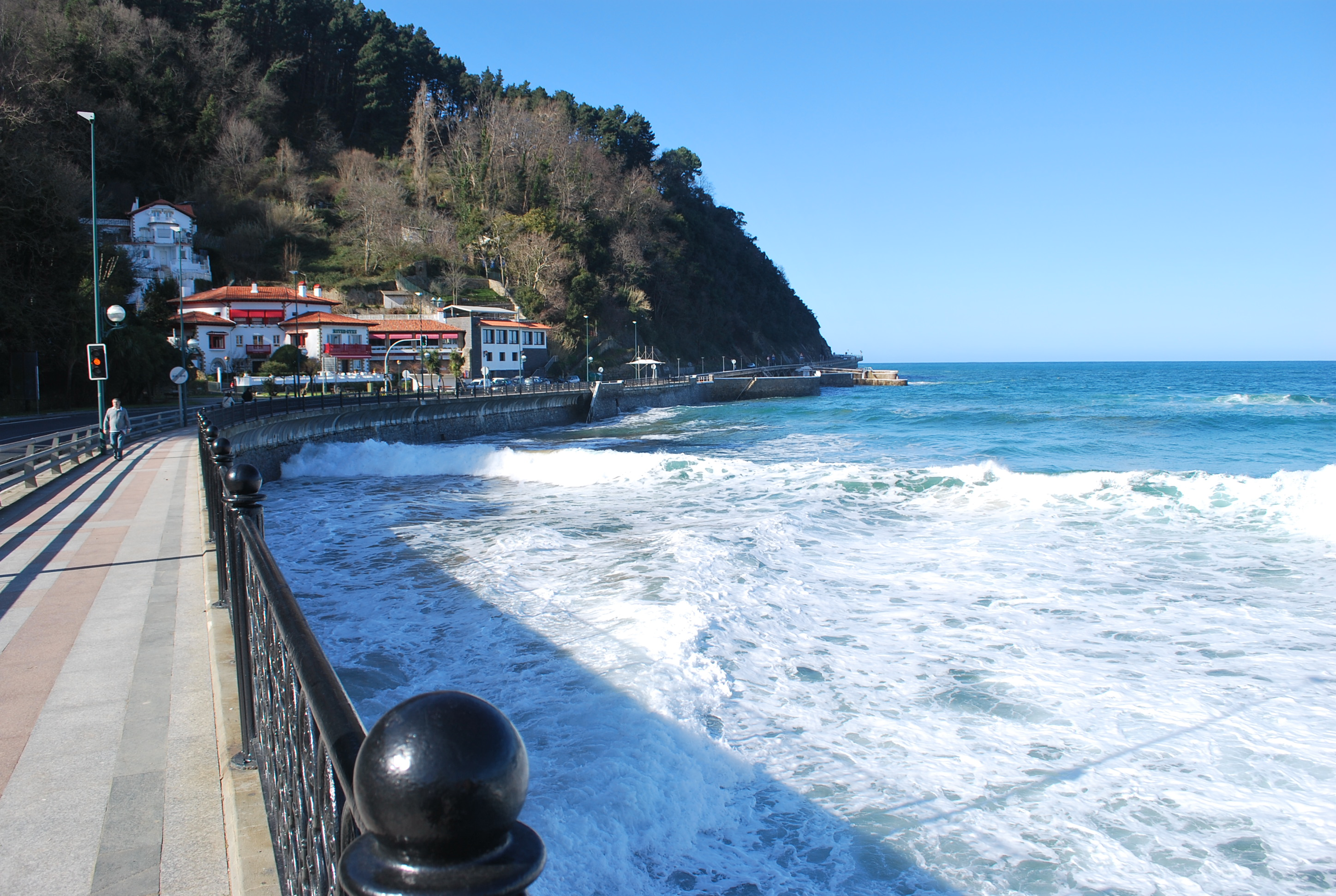 Route de Getaria à Zarautz (28/02/2010) (Guipuscoa).